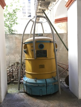 La campana sita nell'atrio e usata nelle operazioni di recupero delle anfore